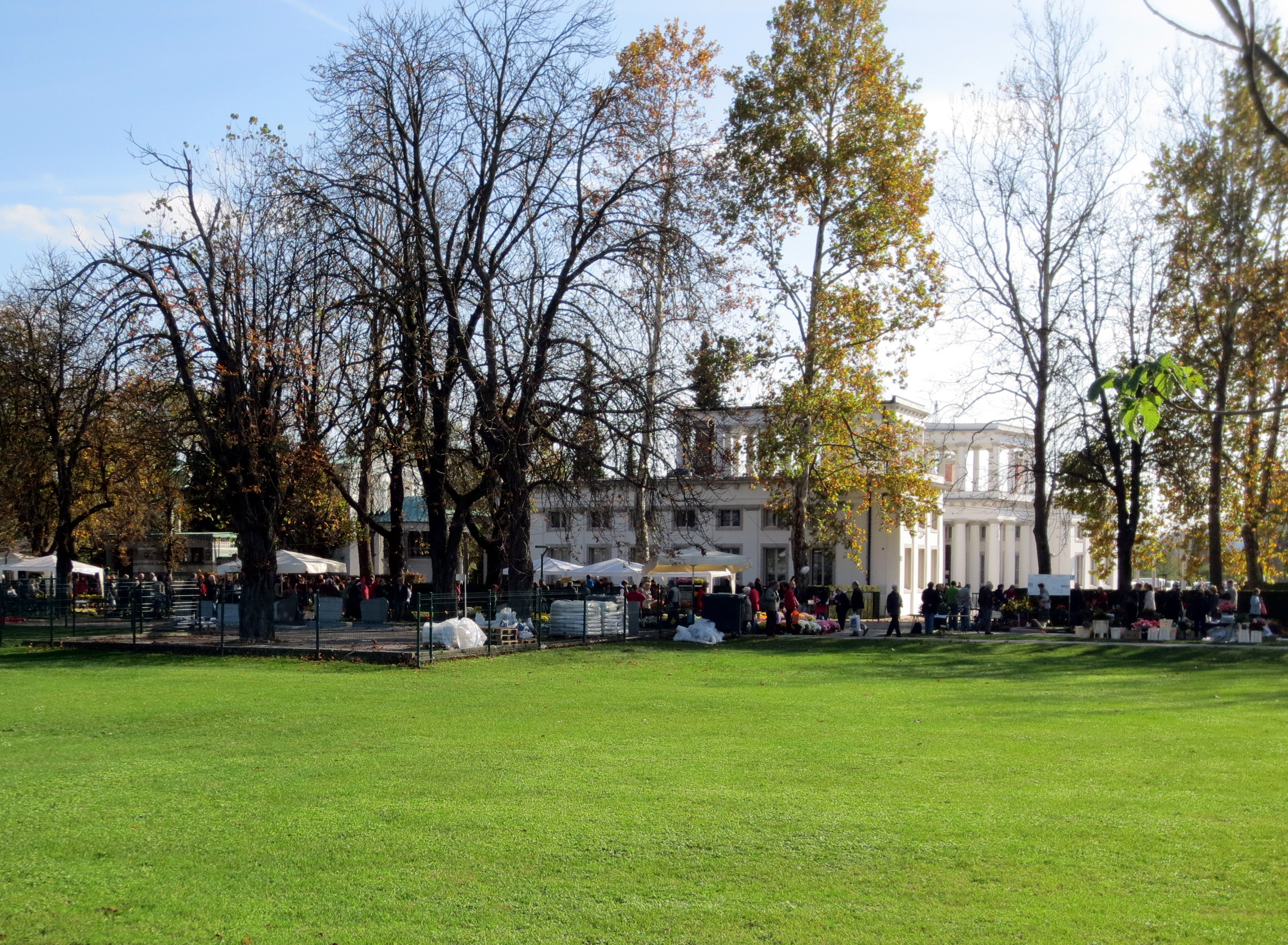 Žale na dan mrtvih